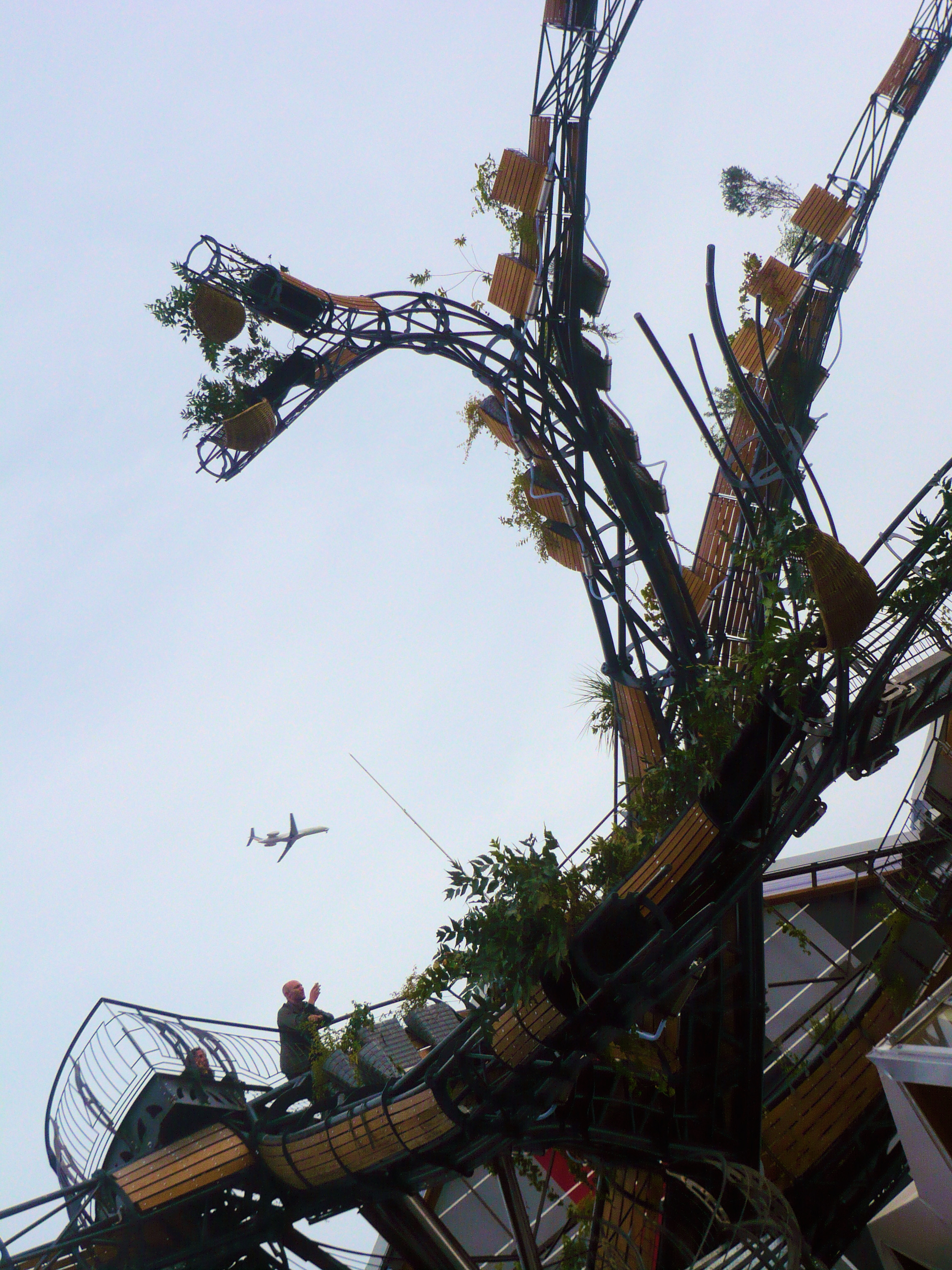 Branche prototype de l'Arbre aux Oiseaux (un des éléments des Machines de l'Île de Nantes